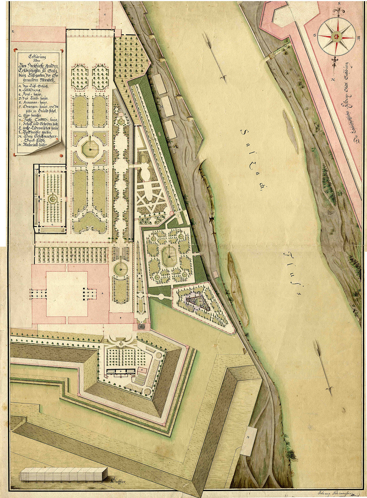 J. Schimoußek: Plan der Anlage von Schloss Mirabell, 1775